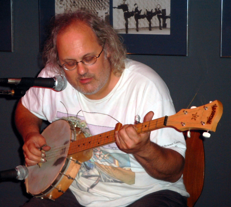 Der Jazz- und Experimentalmusiker Eugenen Chadbourne beim Auftritt als "Me & Paul" mit Paul Lovens im Club W71 in Weikersheim